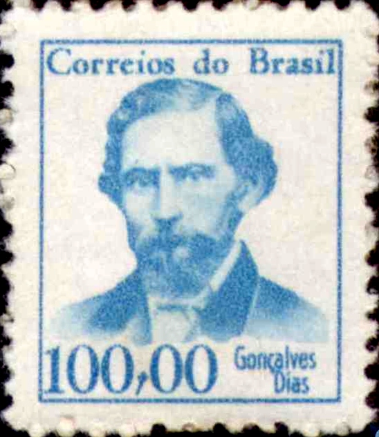 Estampilla de Brasil 1965: Goncalves Dias